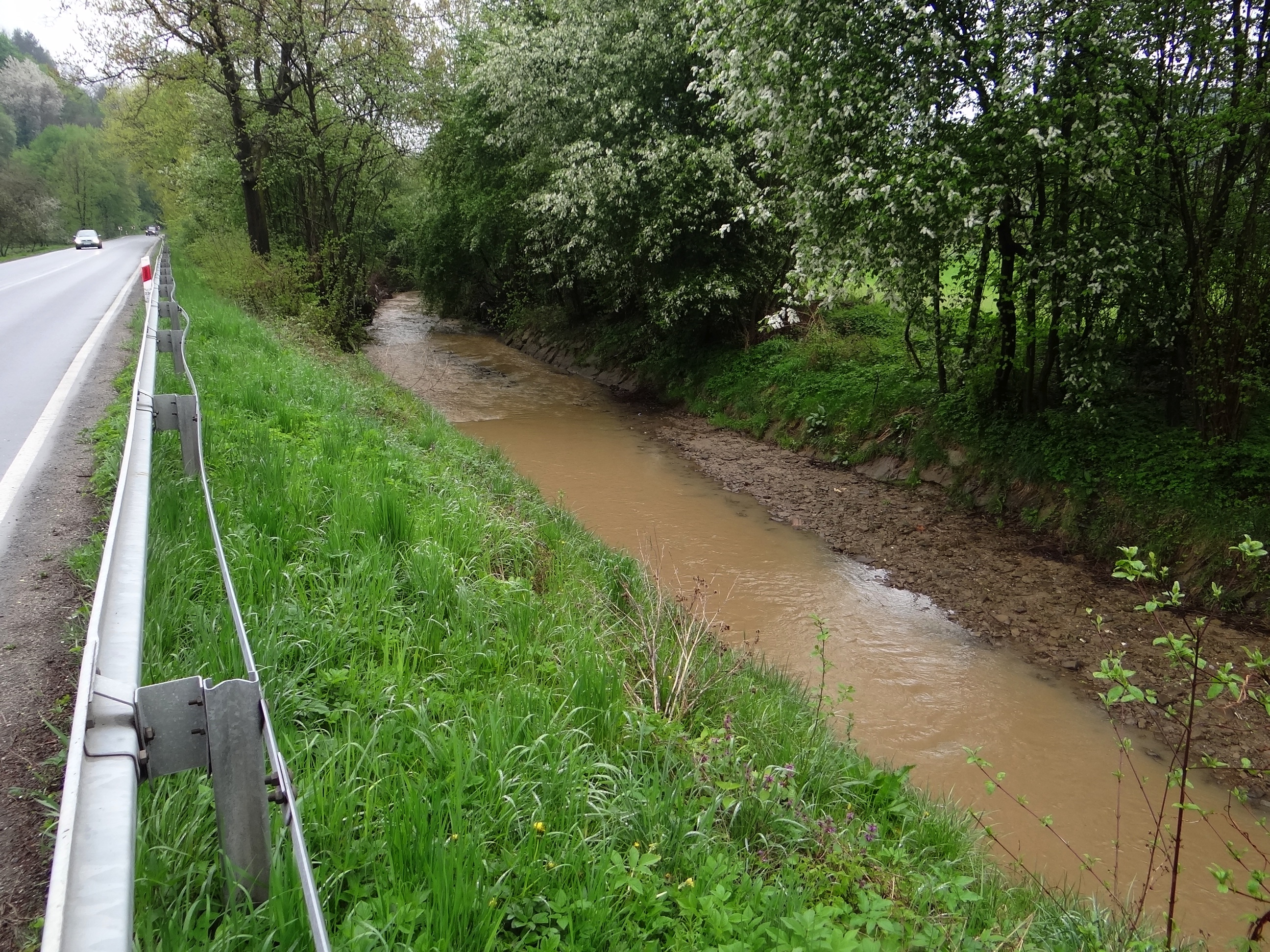 Paleśnianka w Bieśniku